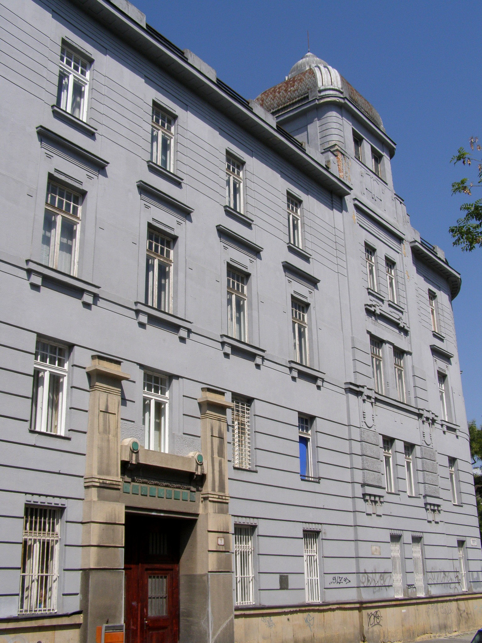 Fajnorovo nábrežie č. 1. Bývalá vládna budova, dnes Filozofická fakulta Univerzity Komenského Object location48° 08′ 24″ N, 17° 06′ 58.32″ E